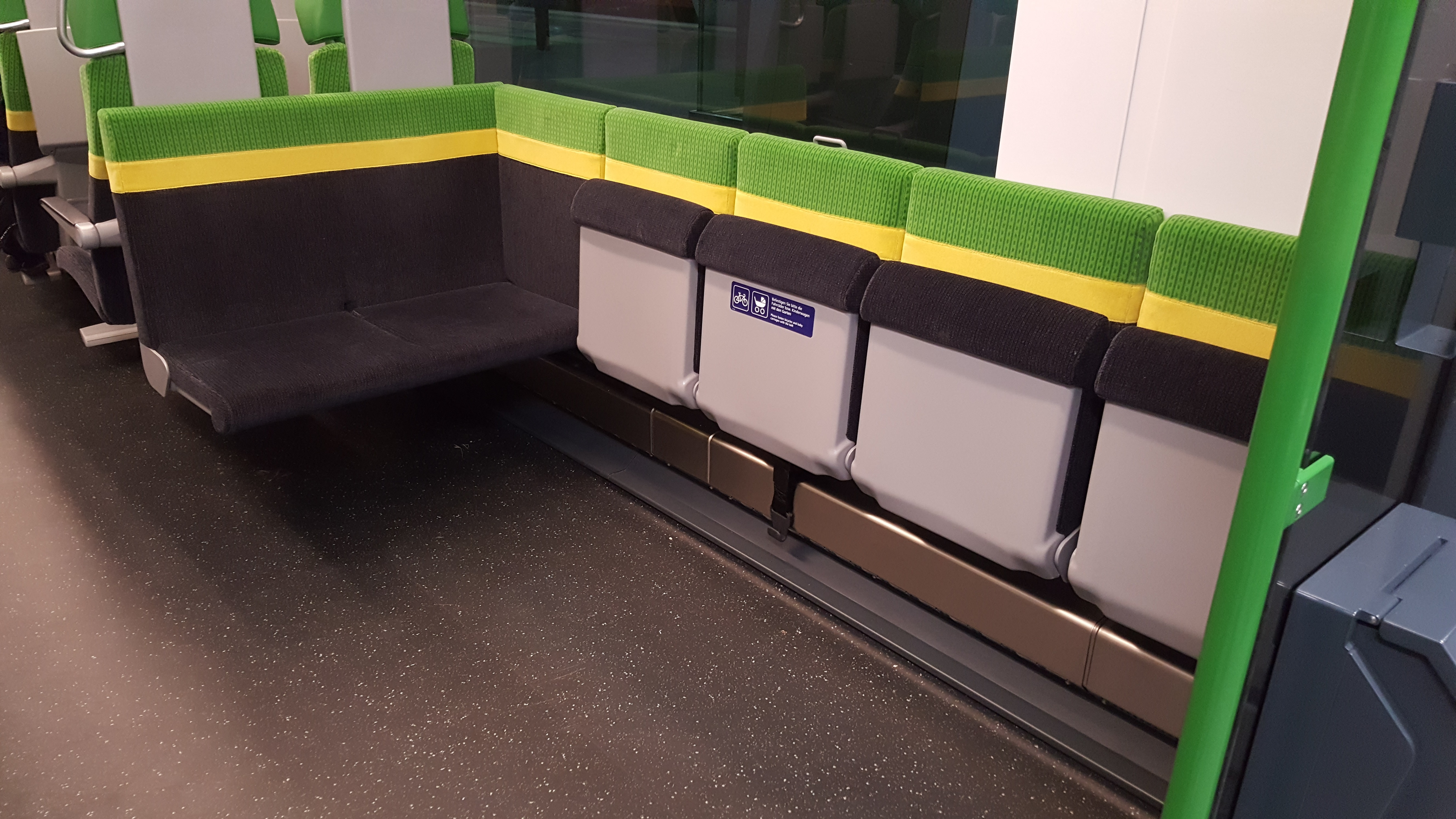 Mehrzweckbereich z.B. für Fahrräder im GySEV Ventus